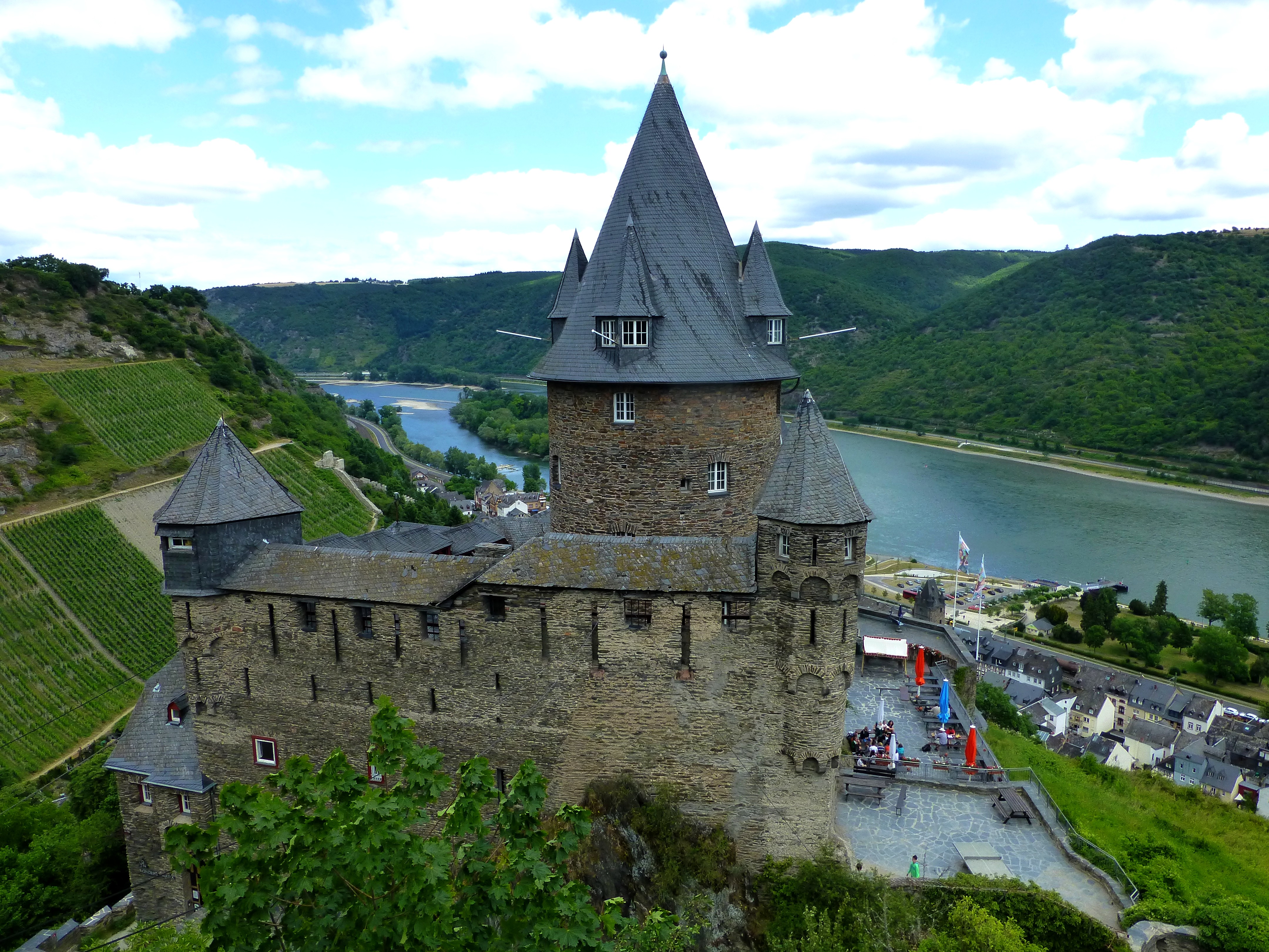 Bacharach – Burg Stahleck